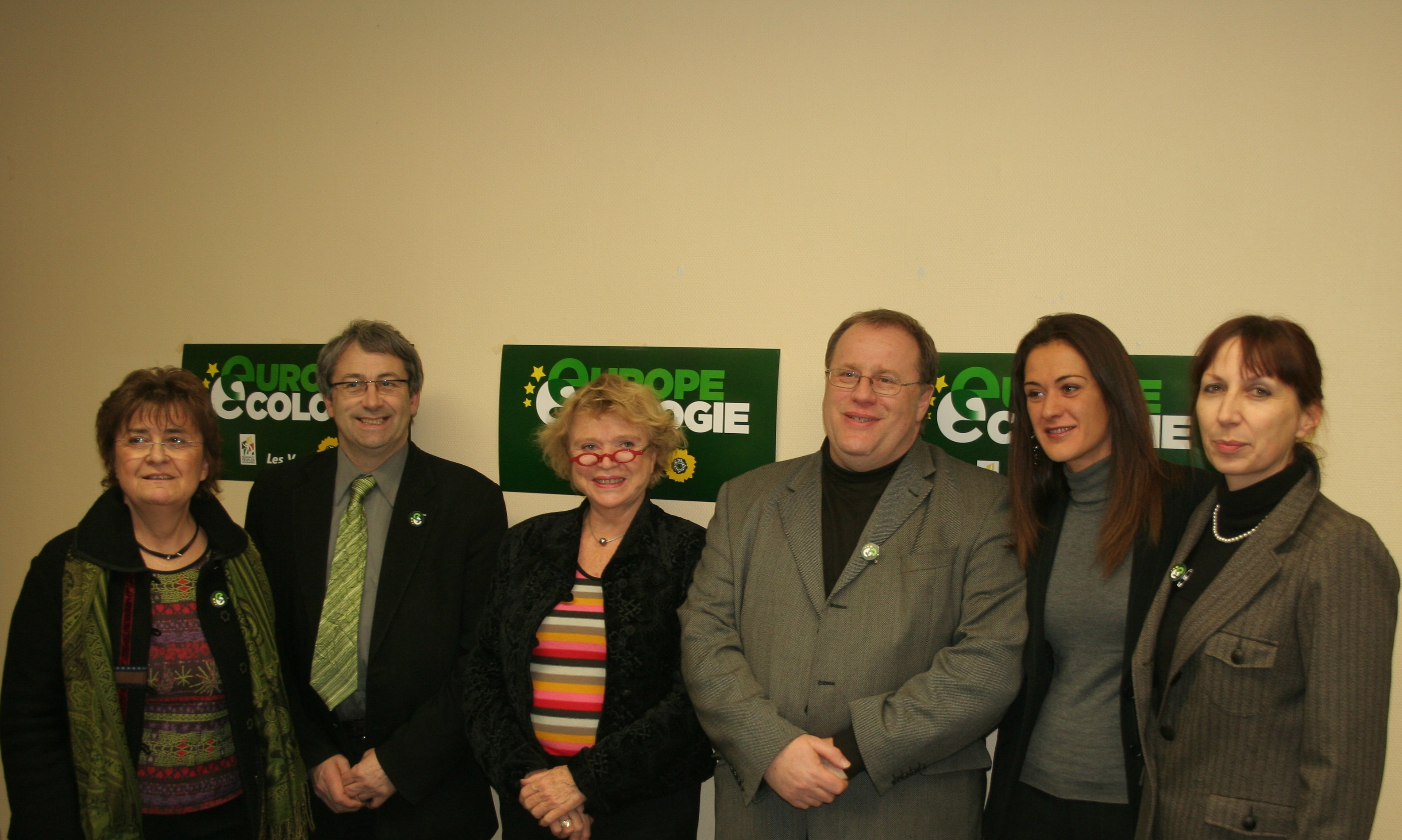 Têtes de listes départementales Europe-Écologie en Franche-Comté et députés européens en Meeting à Vesoul le 15-02-2010.